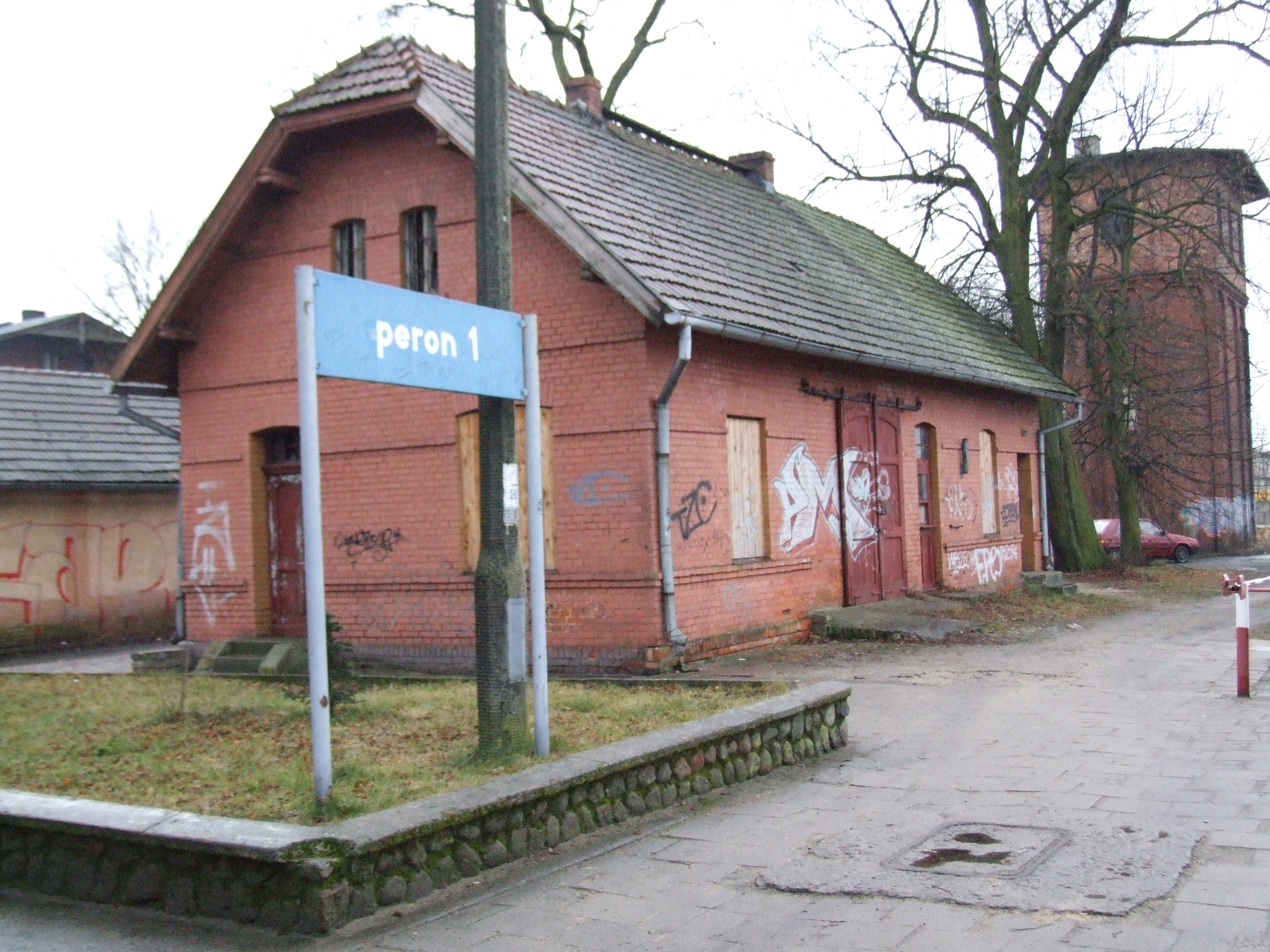 Czersk (dworzec kolejowy)